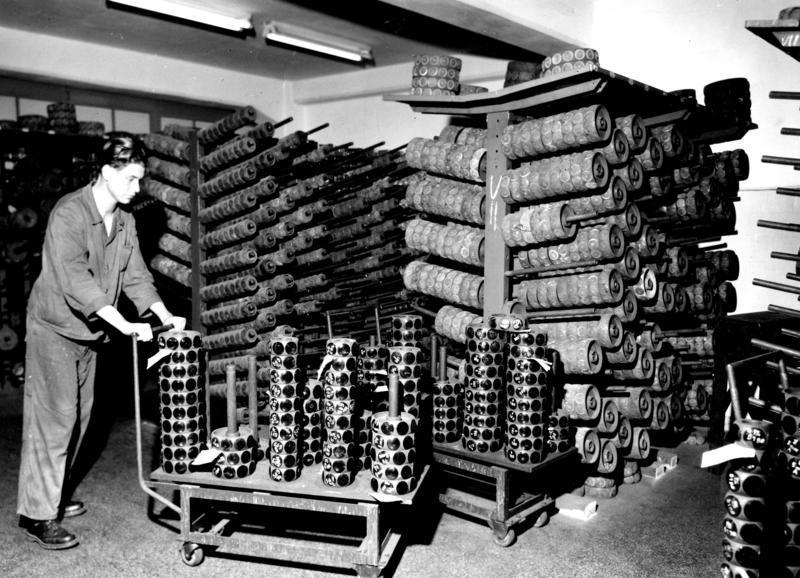 Göttingen Fertigungsstätte der Emil Busch AG Ausschnitt aus dem umfangreichen Werkzeugsatz für torische Brillengläser